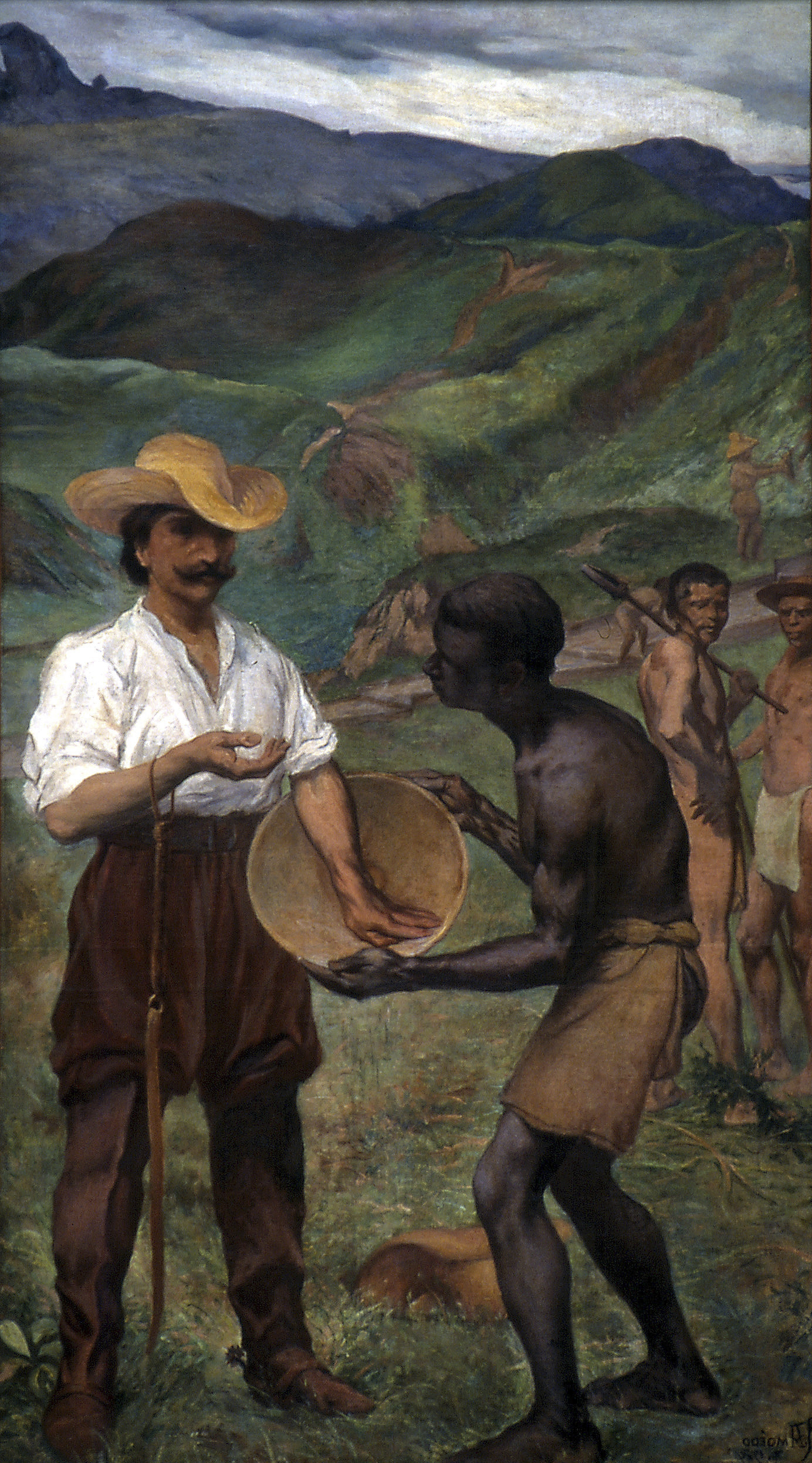 Obra que integra o acervo do Museu Paulista da USP. Coleção Fundo Museu Paulista - FMP